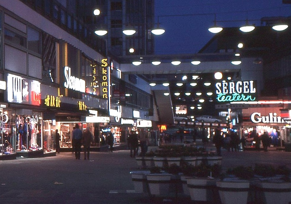 Sergelteatern i Stockholm en höstkväll 1985